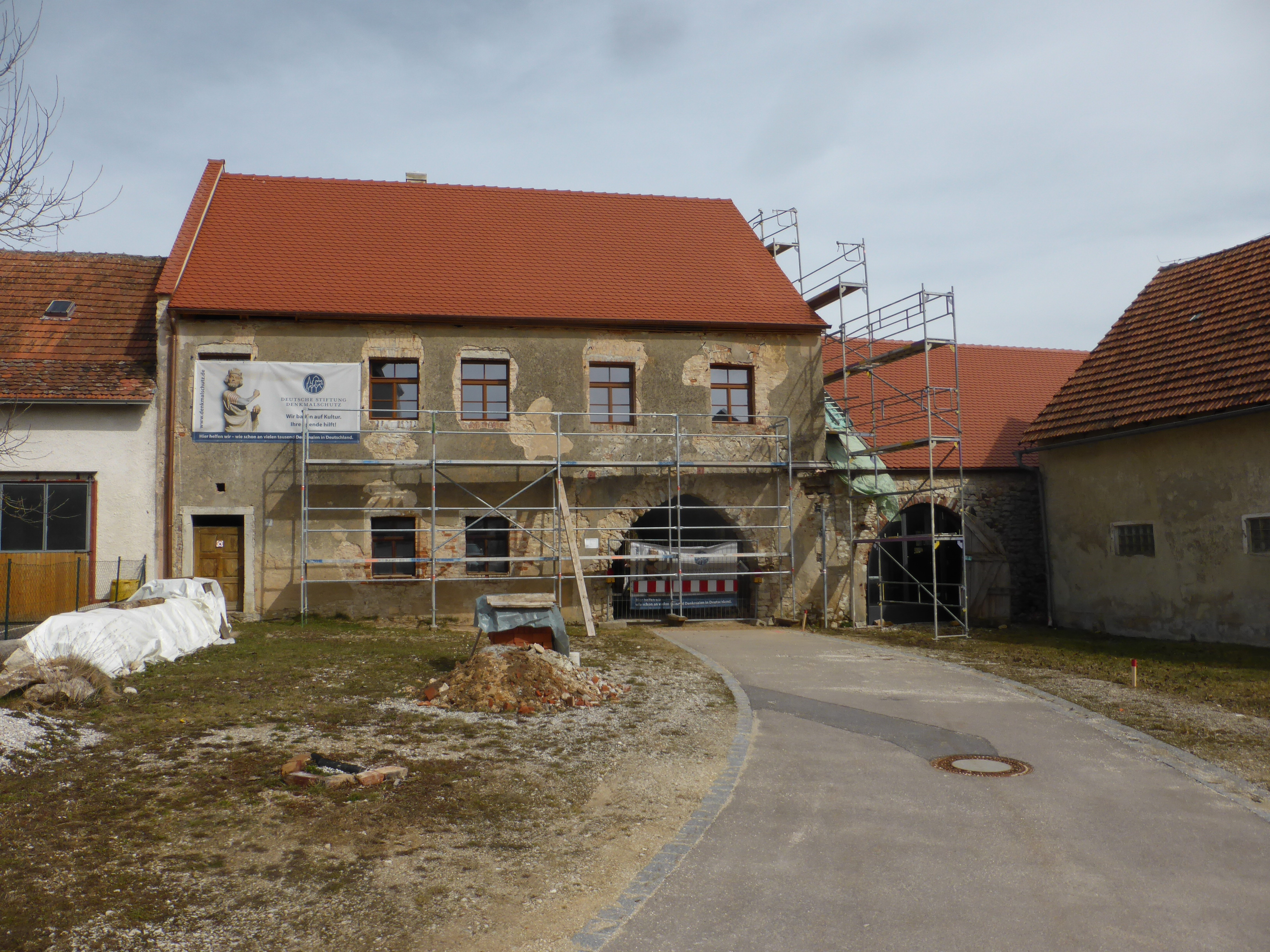 Torhaus Hirschwald (Ensdorf)